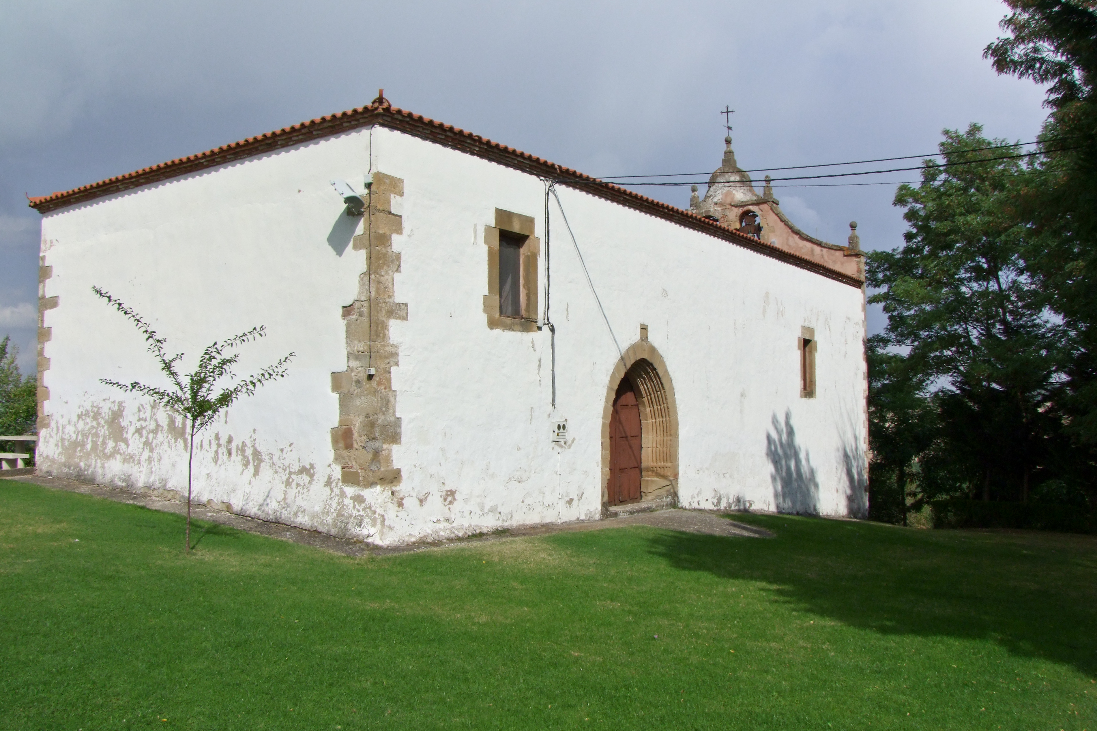 Ermita de la Virgen de la Cuesta en la localidad de Santurde de Rioja, La Rioja - España